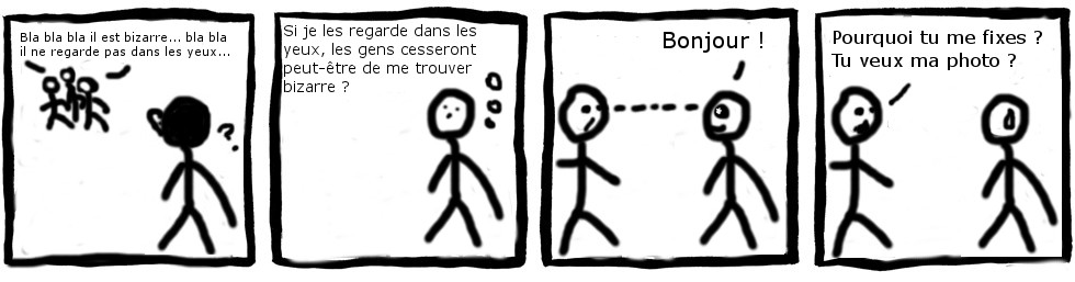 Strip de 4 cases expliquant l'apprentissage du langage corporel chez les autistes, souvent dans la douleur.